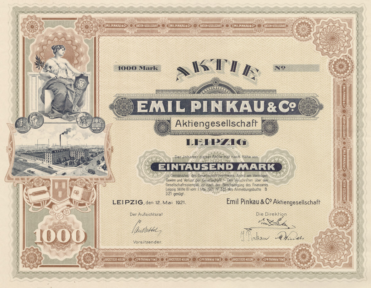 Aktie der Emil Pinkau & Co AG, 1921. Die Firma war für ihre sehr feinen, nicht kopierbaren Aktiendrucke bekannt.